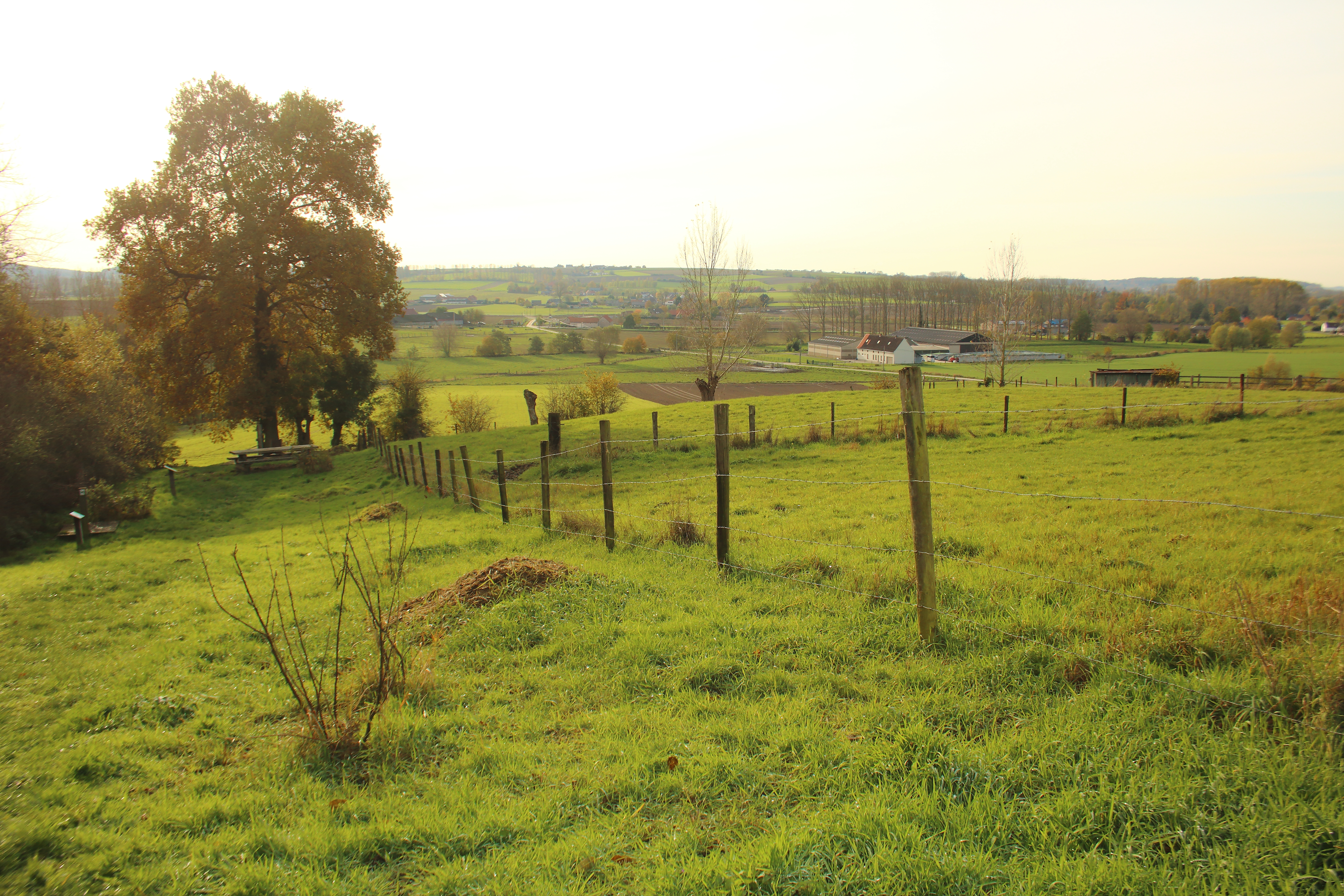 Wereldboom Horebeke, Maarkebeekvallei, Vlaamse Ardennen, Vlaanderen, België